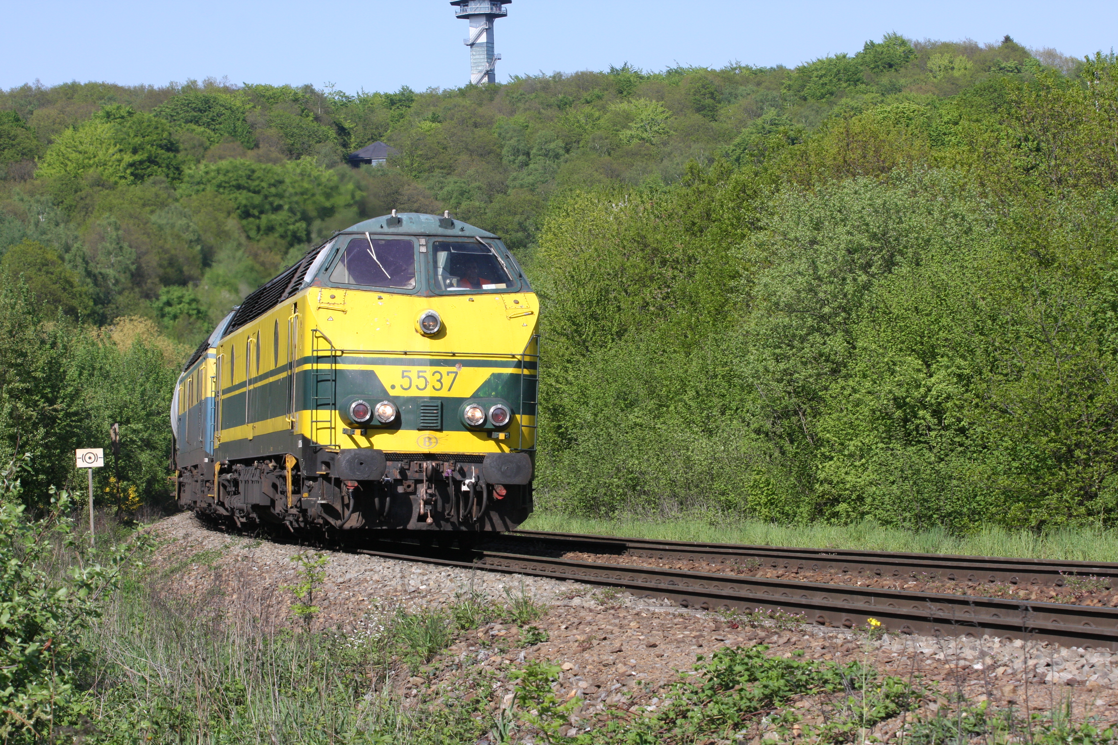 Loc 5537 te Gemmenich op de Montzenroute met een keteltrein